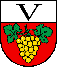 Wappen von Vallamand Kanton Waadt Schweiz